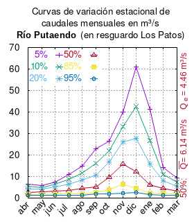 Curvas de variación estacional del río Putaendo en resguardo Los Patos. # Dirección General de Aguas # Diagnóstico y clasificación de los cursos y cuerpos de agua según objetivos de calidad. Cuenca del río Aconcagua. # Santiago de Chile # Ministerio de Obras Públicas (Chile) # 2004 # url: # urlarchivo: # Tabla 4.6: Río Putaendo en resguardo Los Patos pág. 55 mes 5% 10% 20% 50% 85% 95% abr 6.486 5.356 4.247 2.727 1.580 1.146 may 5.745 4.946 4.113 2.856 1.739 1.232 jun 7.551 6.304 5.060 3.306 1.929 1.389 jul 10.905 8.567 6.395 3.658 1.838 1.227 ago 14.993 11.473 8.297 4.465 2.082 1.330 sep 22.783 16.154 10.776 5.257 2.568 1.896 oct 26.532 21.810 16.854 9.537 3.951 2.086 nov 39.853 33.211 26.286 15.826 6.535 2.320 dic 60.987 42.700 27.728 12.149 4.396 2.420 ene 41.289 26.614 15.779 6.123 2.329 1.562 feb 14.188 10.980 8.049 4.447 2.141 1.394 mar 9.410 7.462 5.634 3.293 1.699 1.152 This plot was created with Gnuplot.